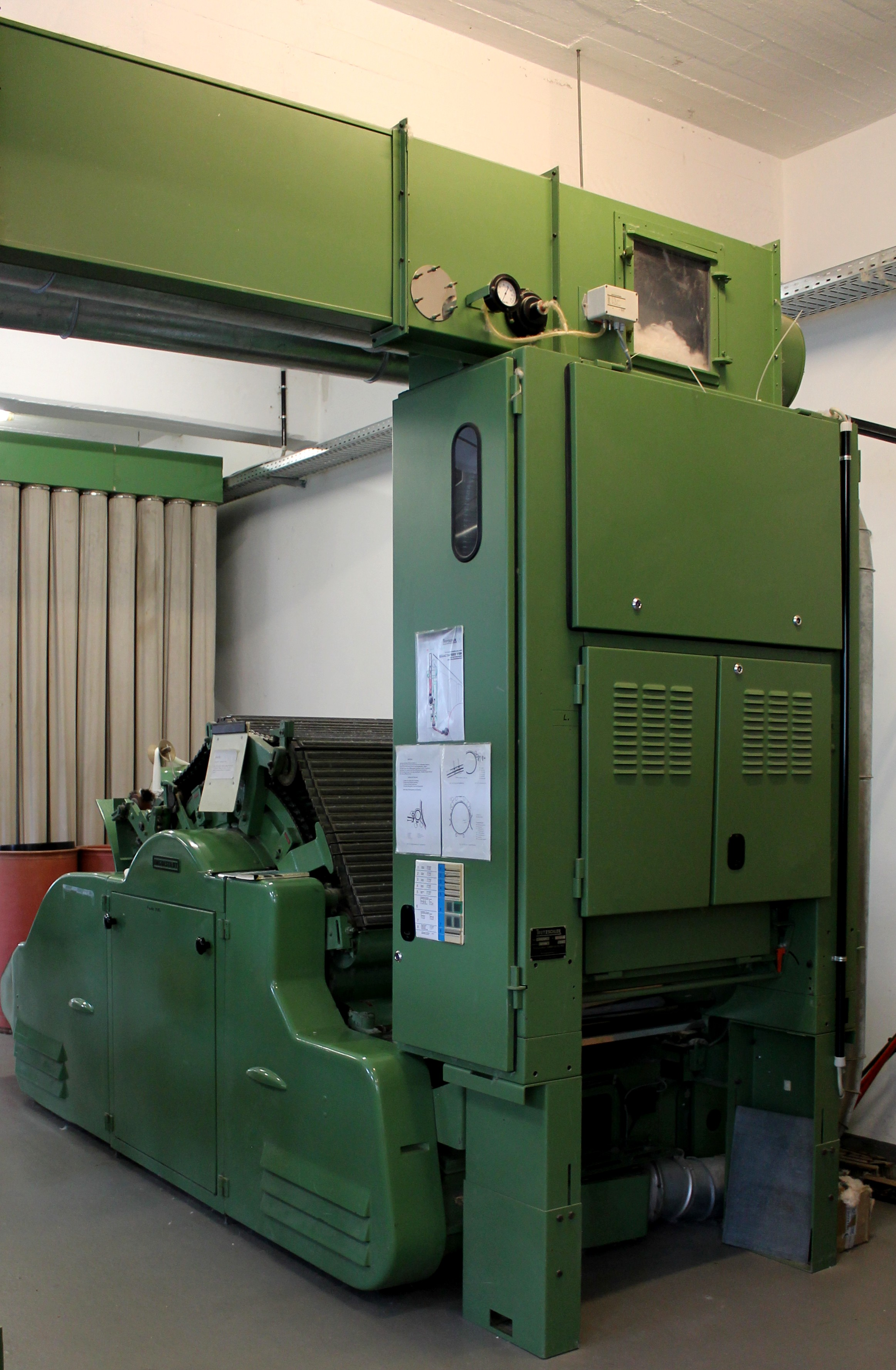 Deckelkarde mit Flockenspeisung